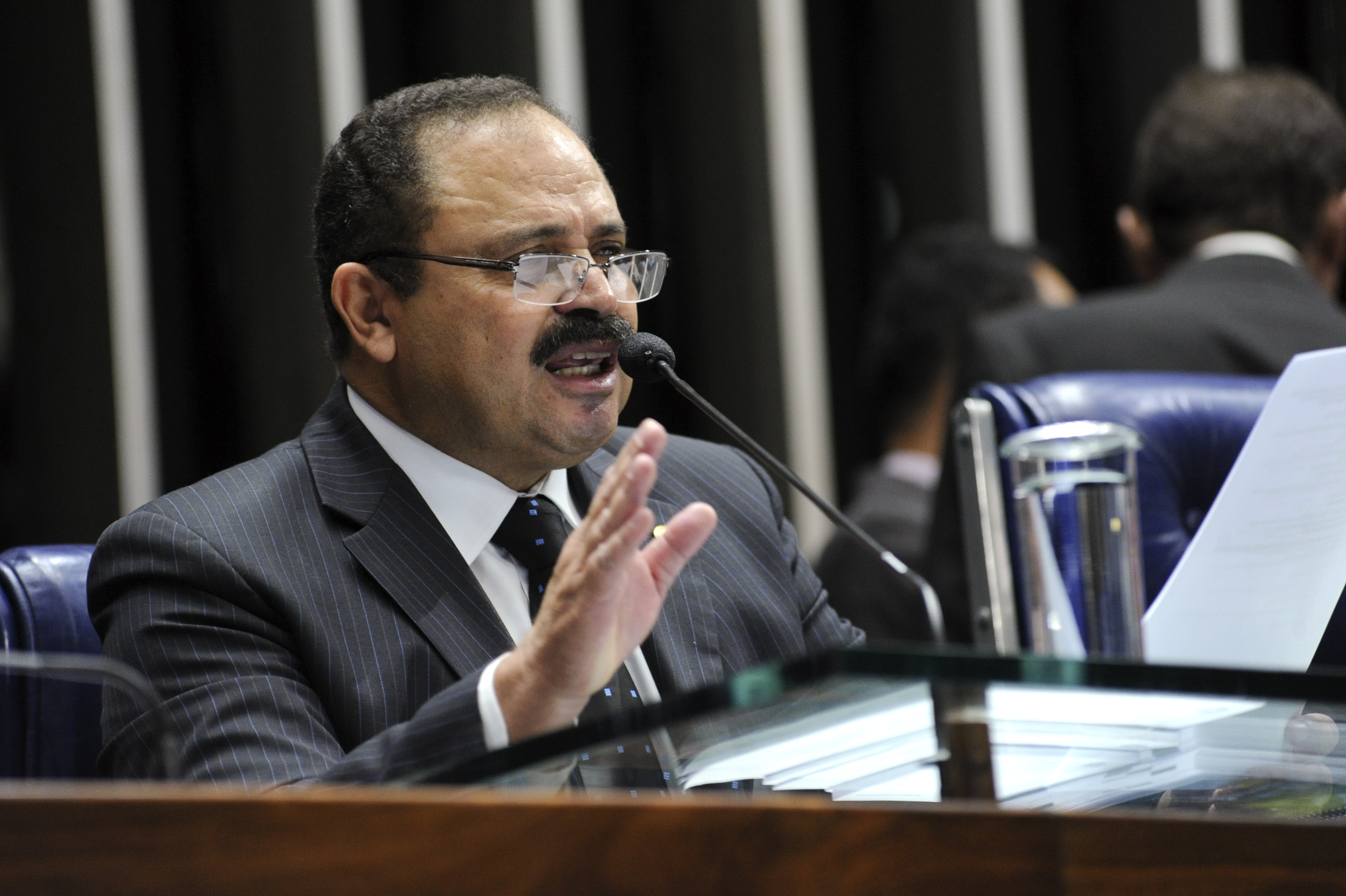 Plenário do Senado durante sessão solene do Congresso Nacional destinada à promulgação da Emenda Constitucional 85/2015, que altera e adiciona dispositivos na Constituição Federal para atualizar o tratamento das atividades de ciência, tecnologia e inovação. Em pronunciamento, deputado Waldir Maranhão (PP-MA). Foto: Geraldo Magela/Agência Senado